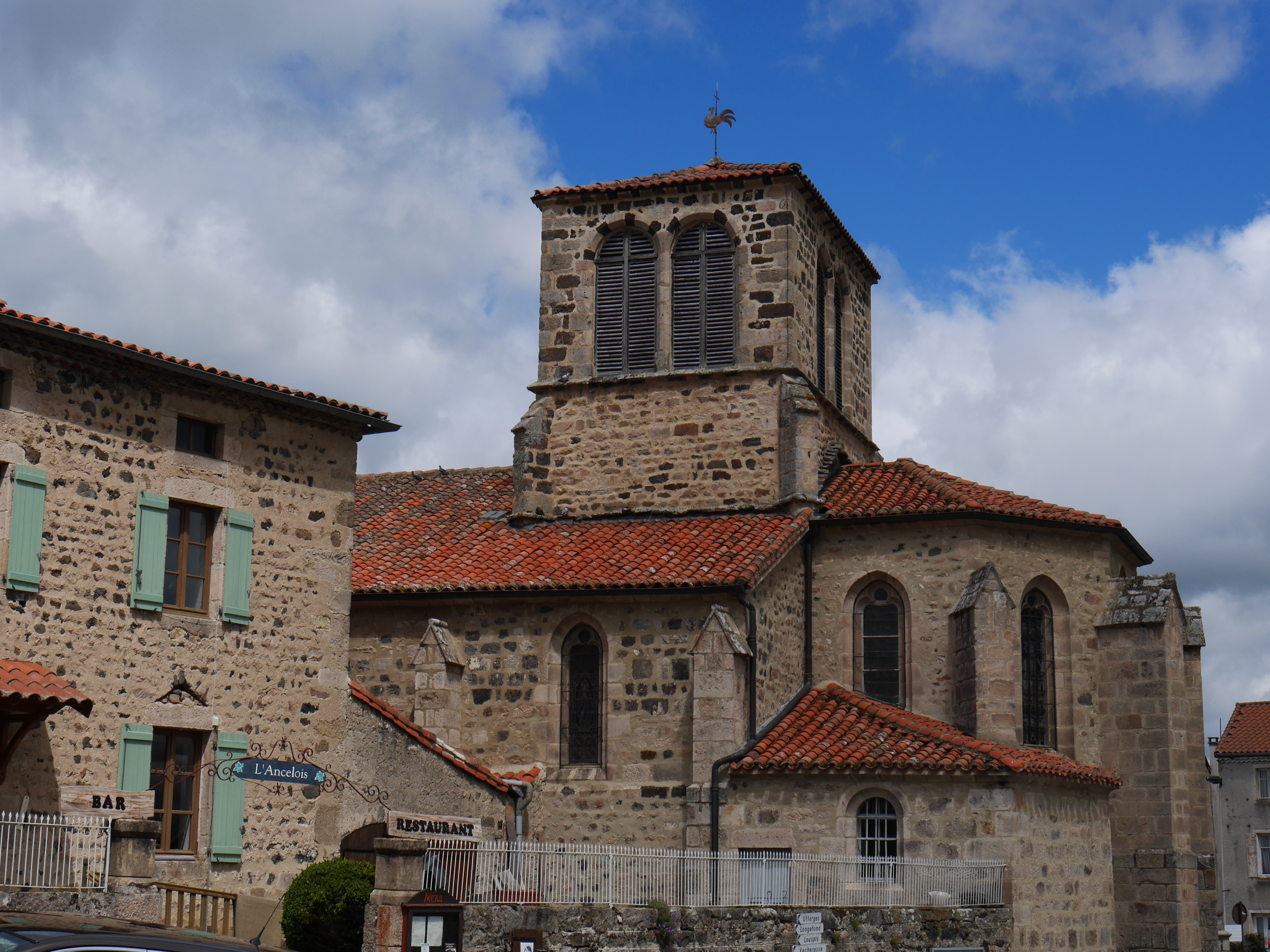 Église Saint-Julien de Saint-Julien-d'Ance, dans la Haute-Loire.